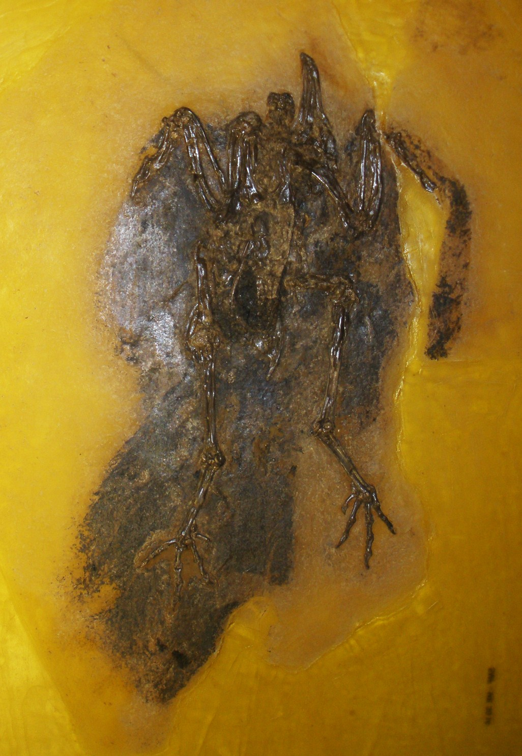 Fossil of Salmila, an extinct bird- Took the photo at Senckenberg Museum of Frankfurt